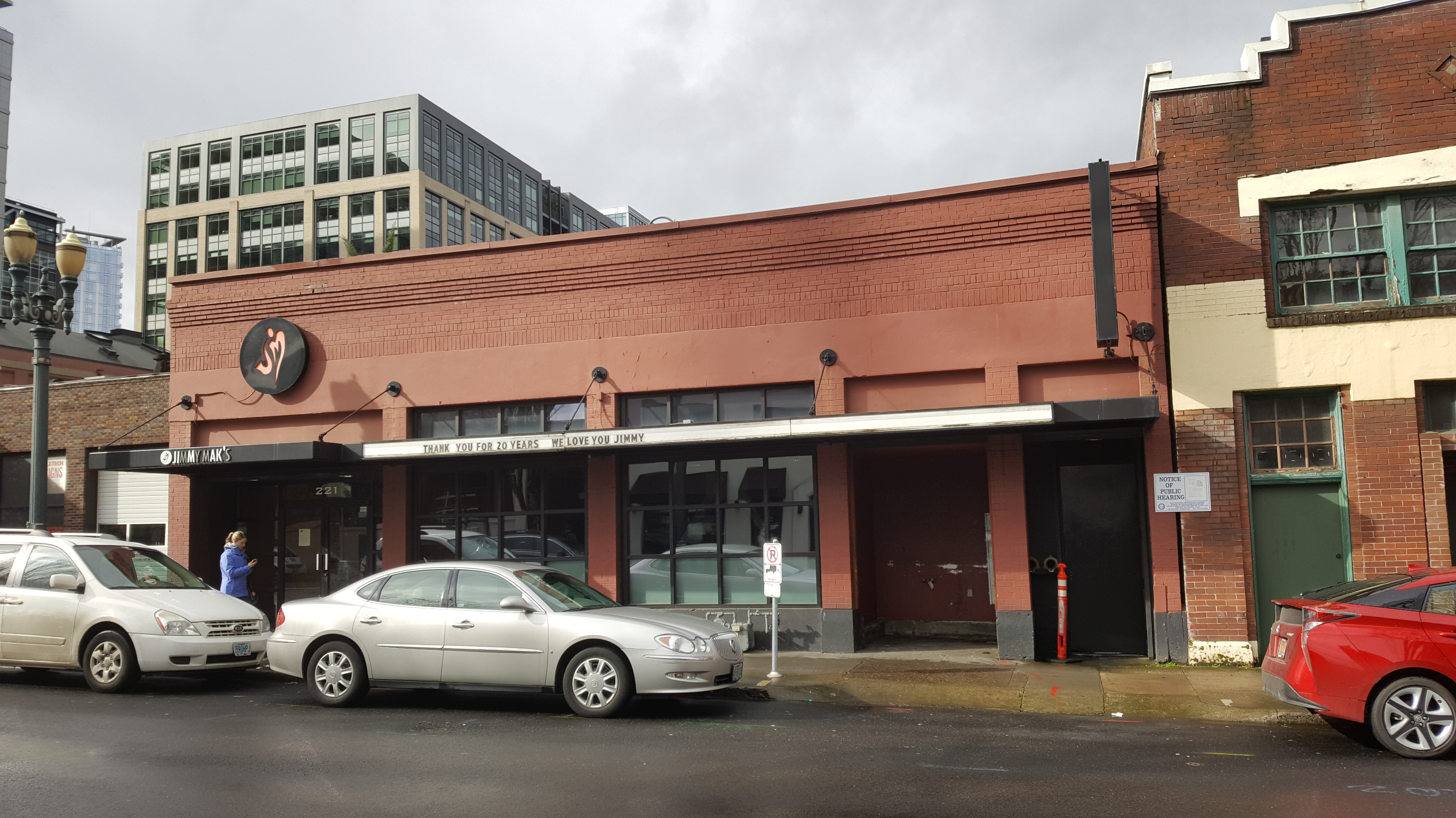 Jimmy Mak's